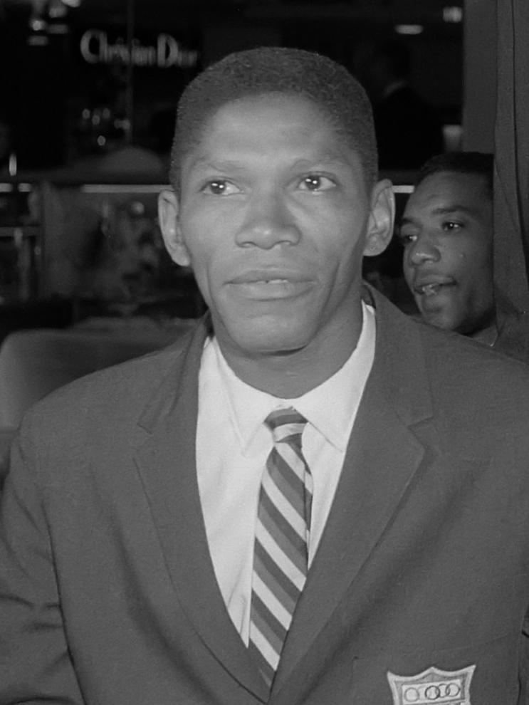 Aankomst Amerikaanse Olympische atleten op Schiphol, v.l.n.r. Otis Davis , Wilma Rudolph en Don Bragg 15 september 1960